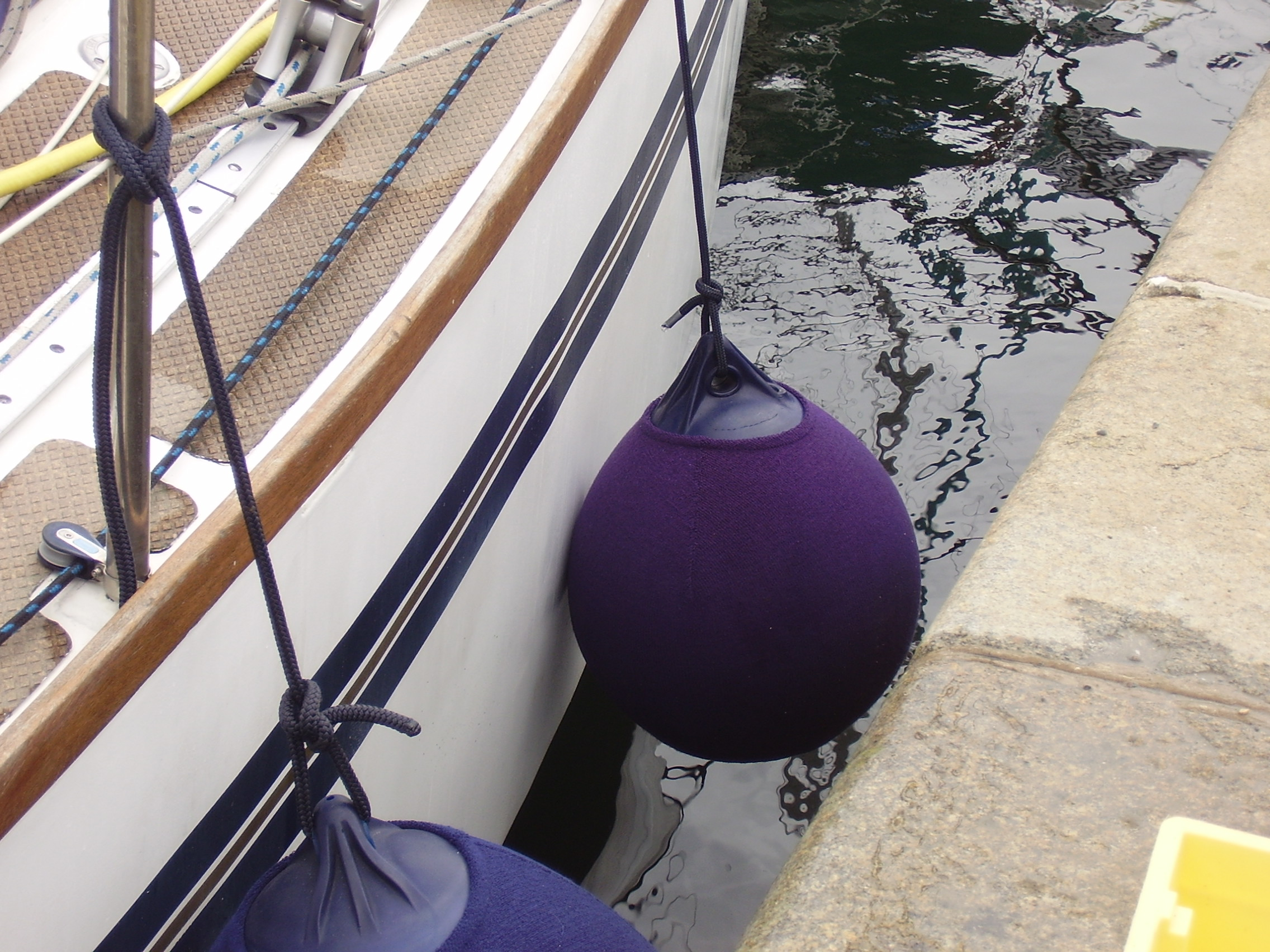 Fenders